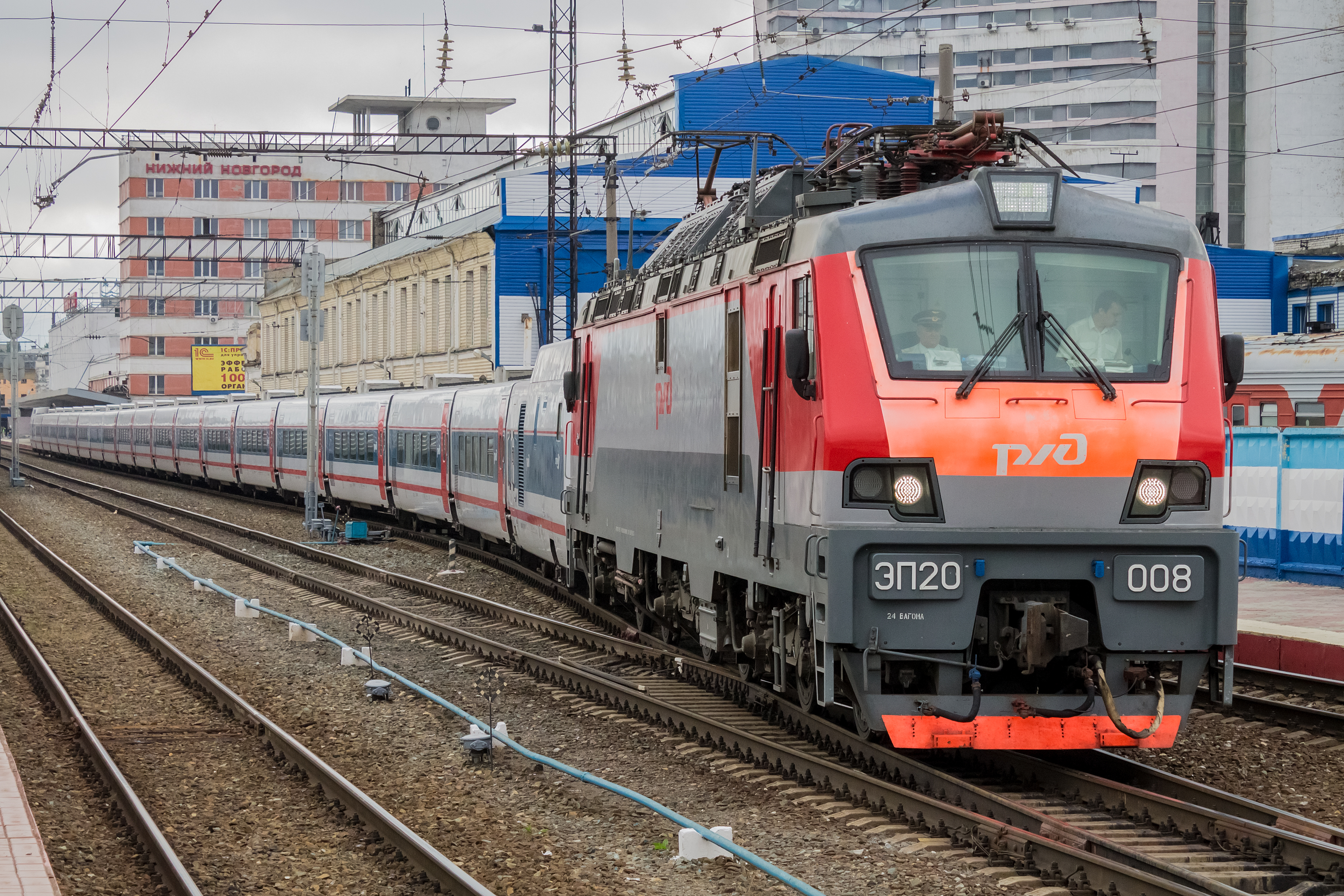 ЭП20-008, поезд Нижний Новгород - Москва, «Стриж», станция Нижний Новгород-Московский см. фото 696930 в альбоме автора See also: Talgo.